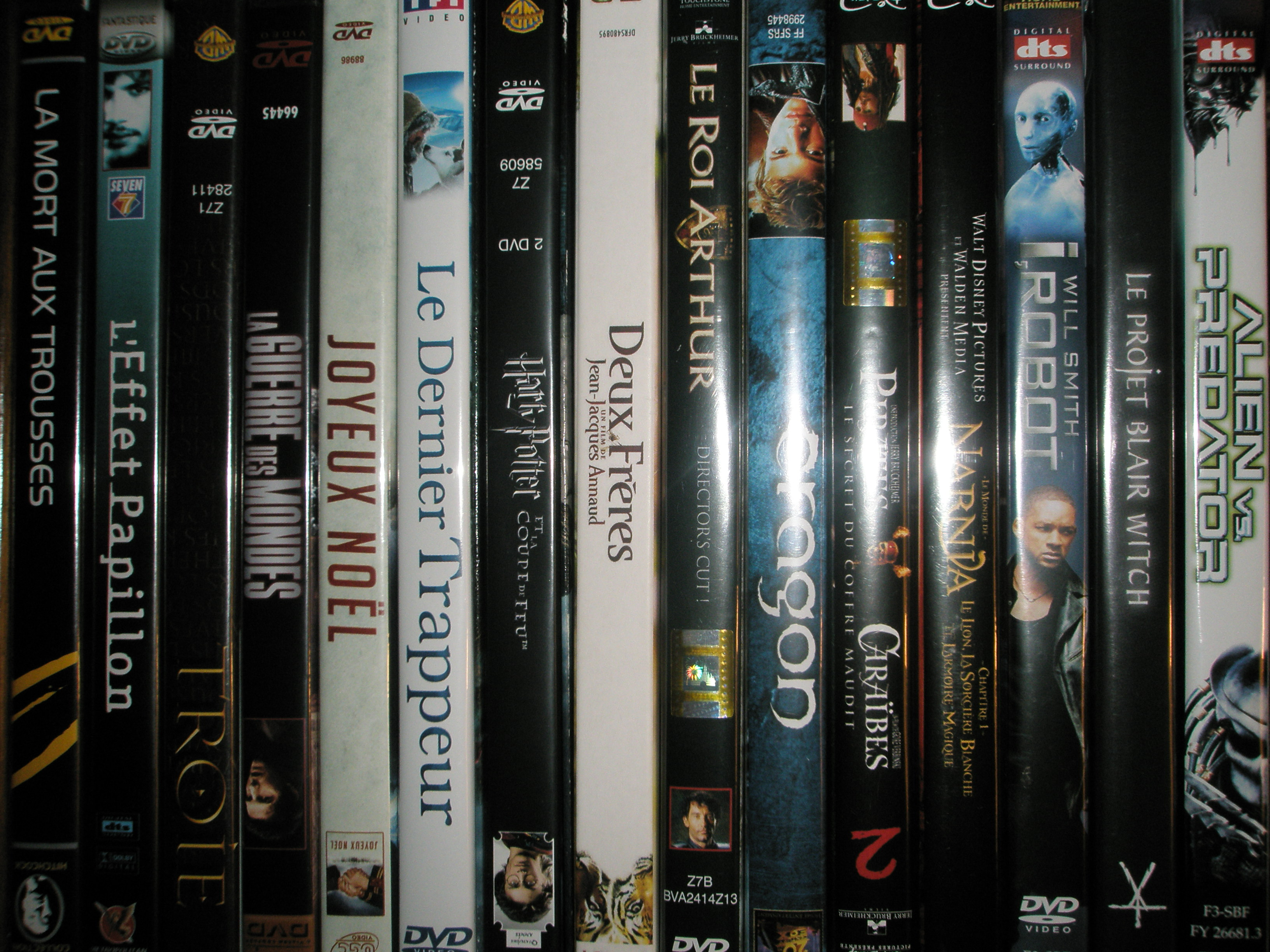 Diverses pochettes DVDs illustrant l'édition vidéo relative au cinéma.